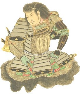 菊池武政の肖像。